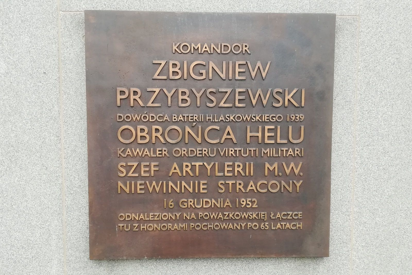 Cmentarz Marynarki Wojennej_Kwatera Pamięci_Komandor Przybyszewski